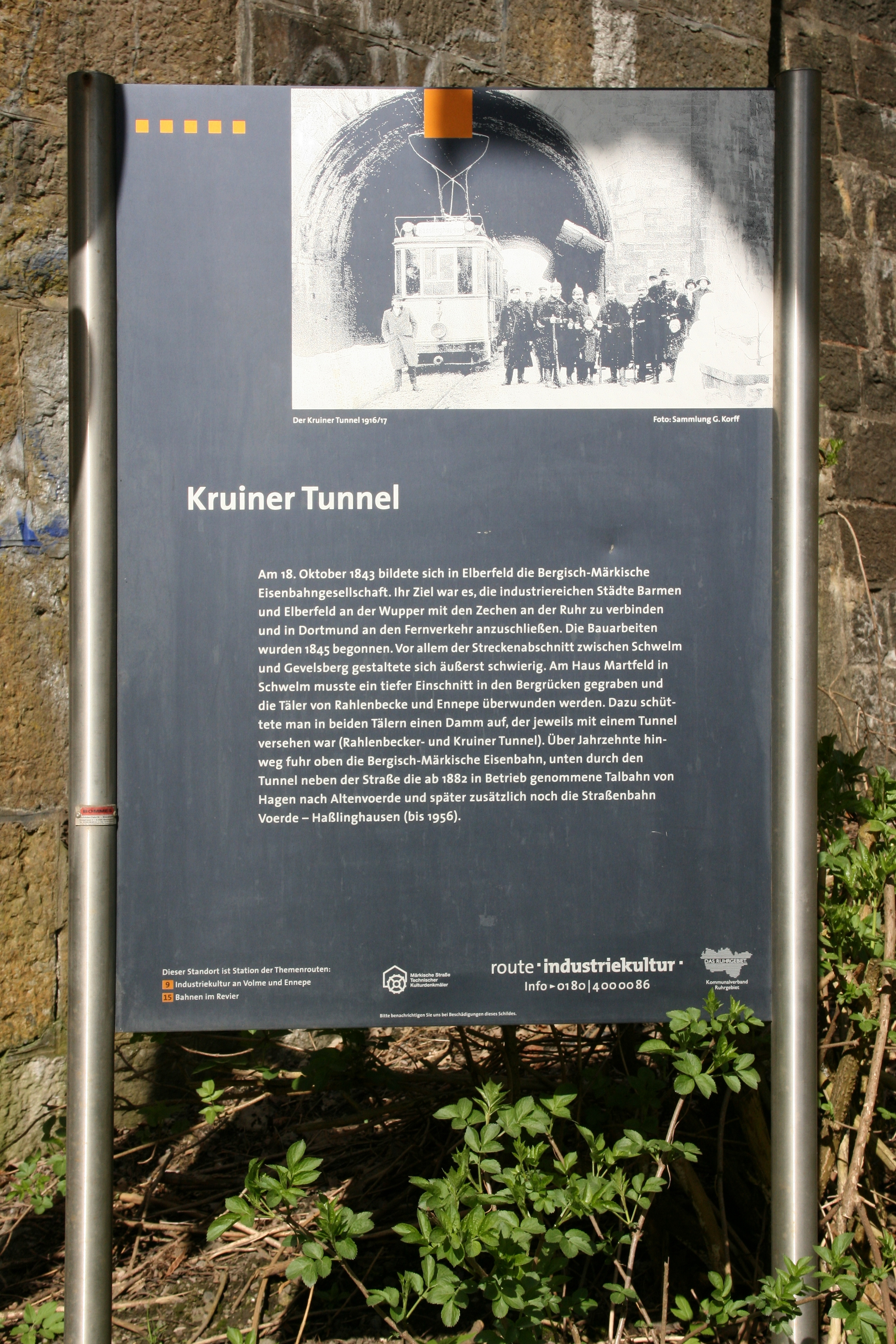 Kruiner Tunnel, Kölner Straße in Gevelsberg